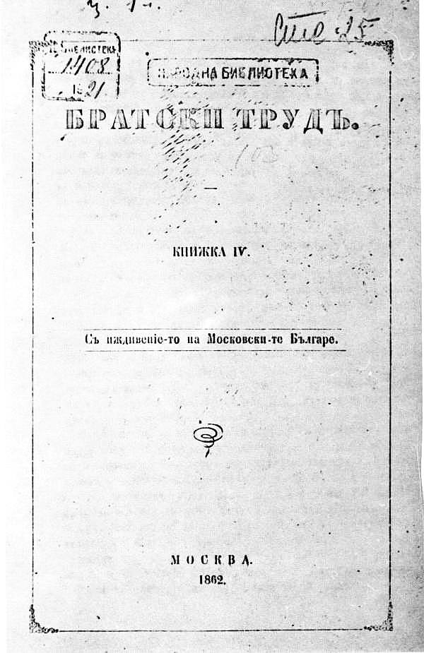 Корица на списание "Братски труд", ІV, 1862